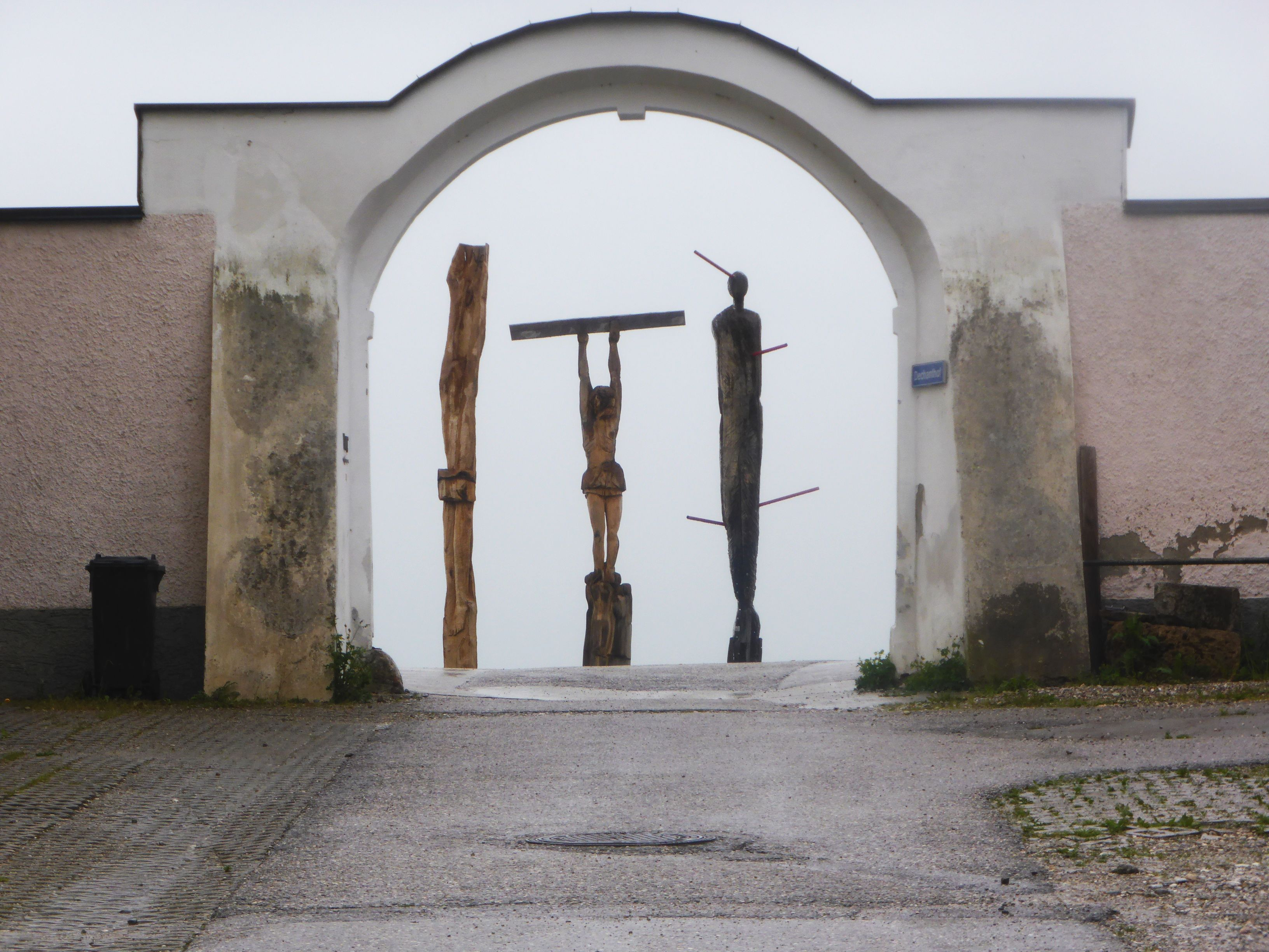 Holzsymposium Lignum 2013: „Golgota“ (Ch. Paulowitz, St. von Quast, P.H. Wiener) [1]